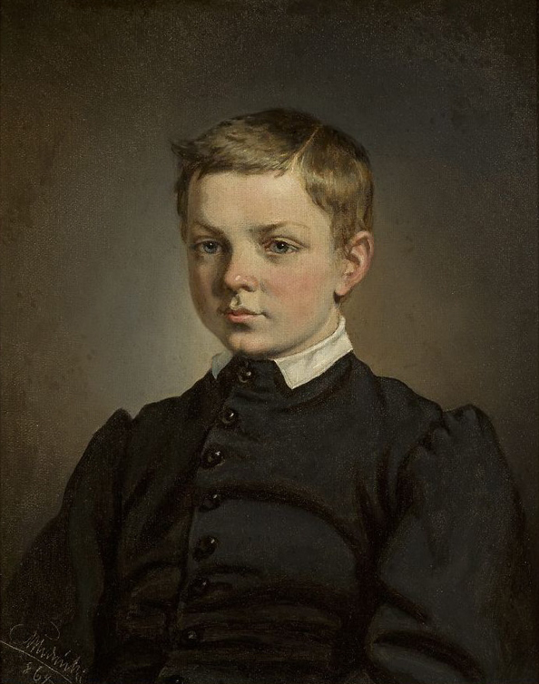 Portret chłopca w popiersiu